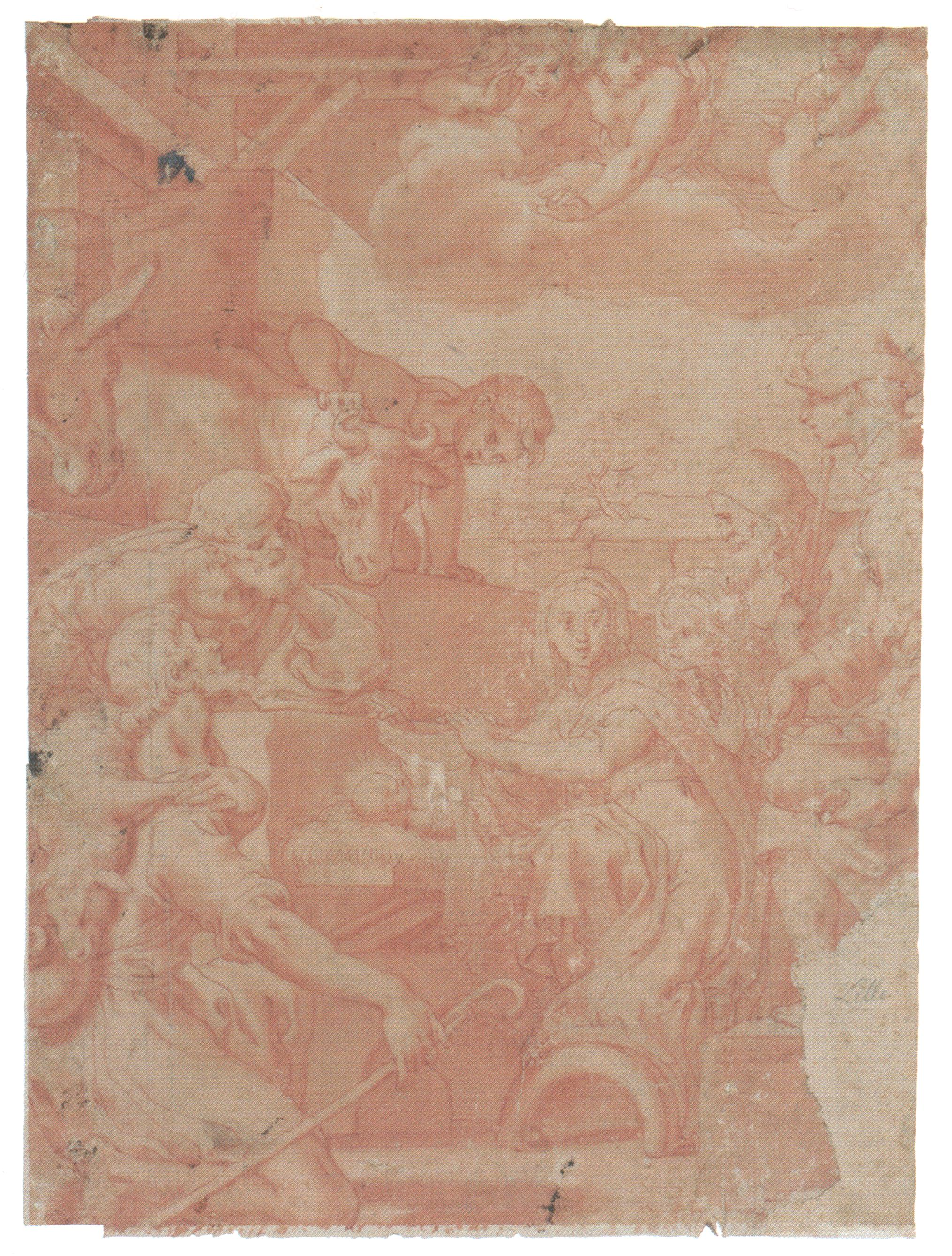 Kabinte grafike HAZU